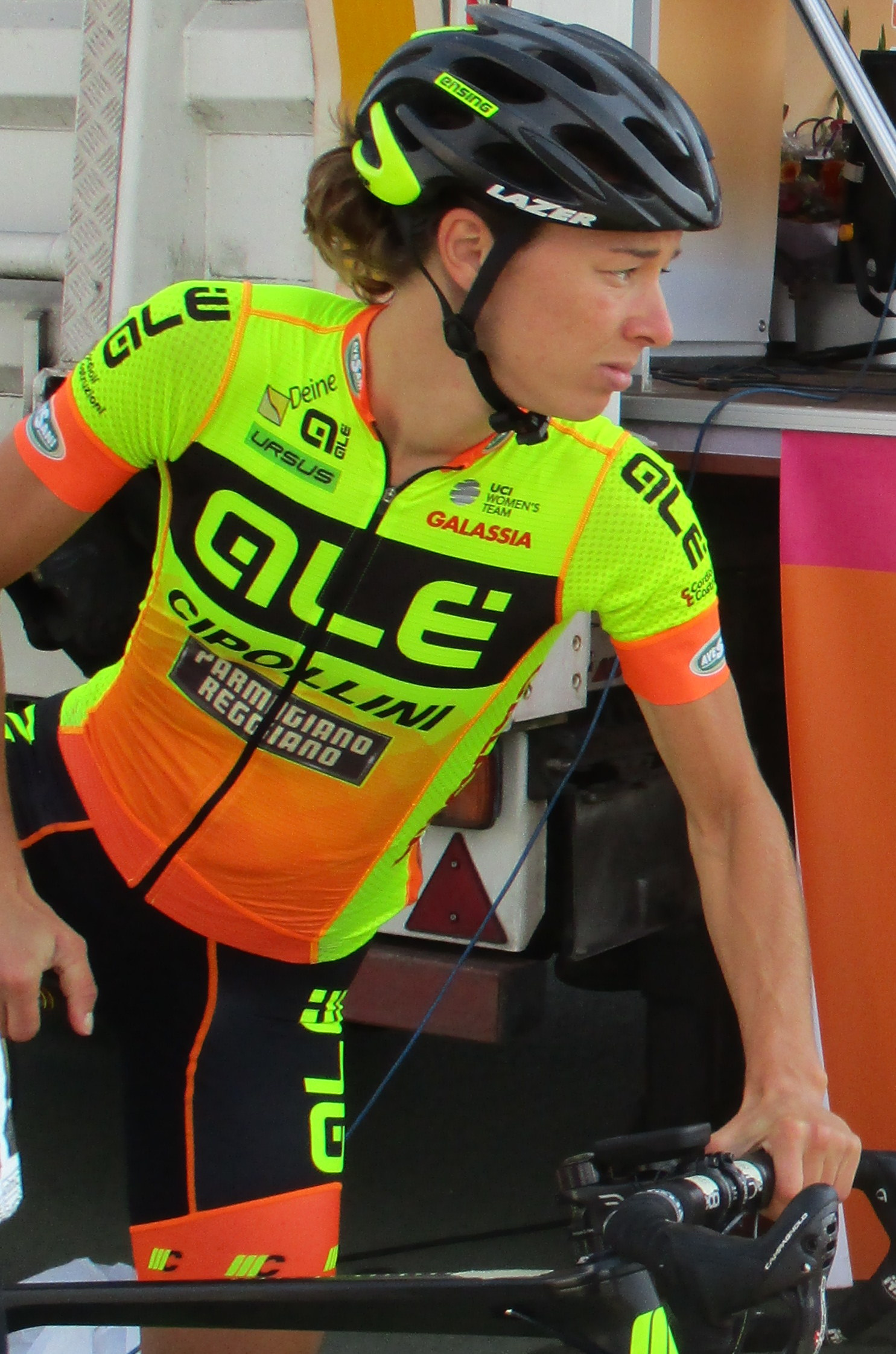 Start van de 6e etappe van de Boels Ladies Tour 2017 op het Tom Dumoulin Bike Park in Sittard-Geleen.